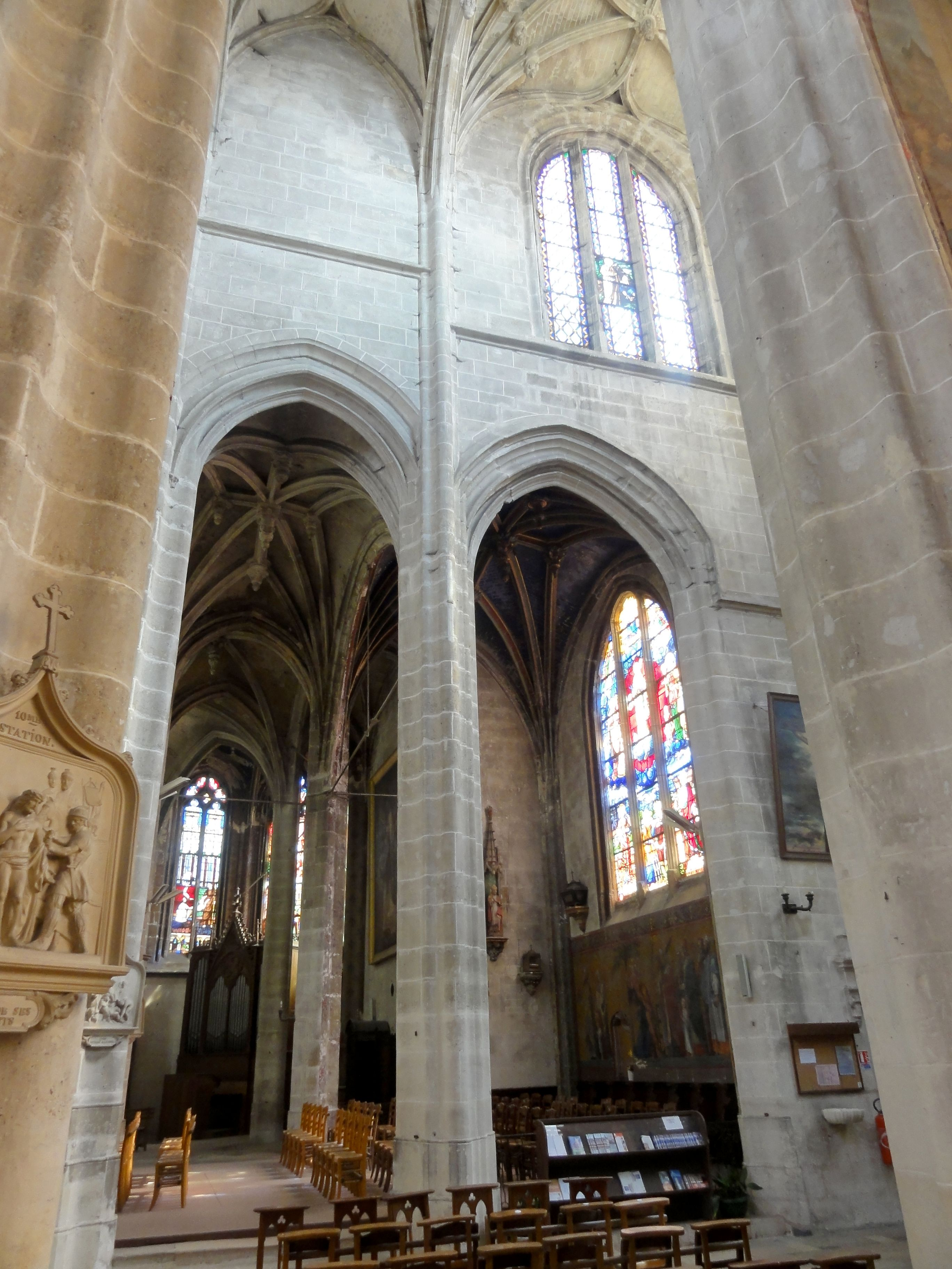 Croisillon sud, vue vers l'est.